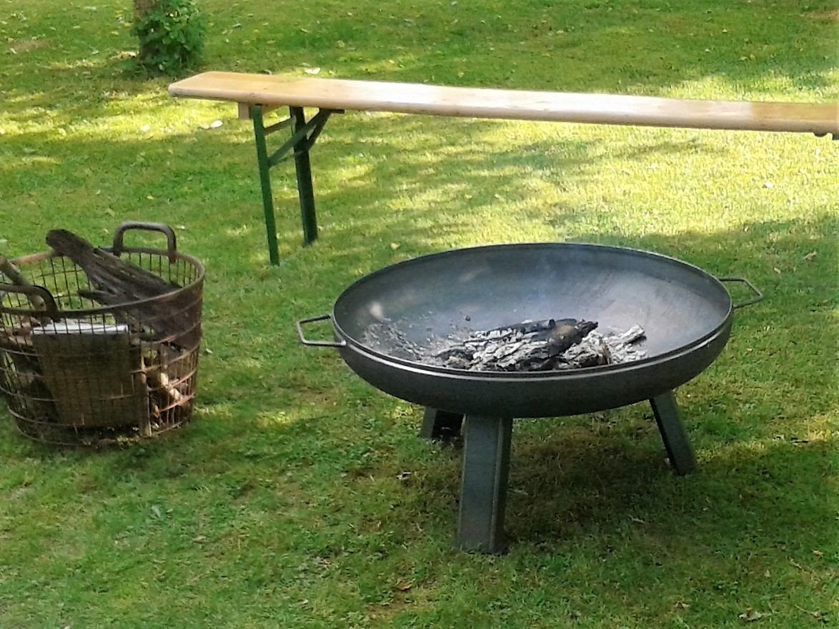 Feuerschale aus Metall, daneben ein Korb mit Brennholz, dahinter eine Bierbank.